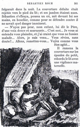 illustration de H.-G. Ibels, pour Sébastien Roch, d'Octave Mirbeau (1848-1917)